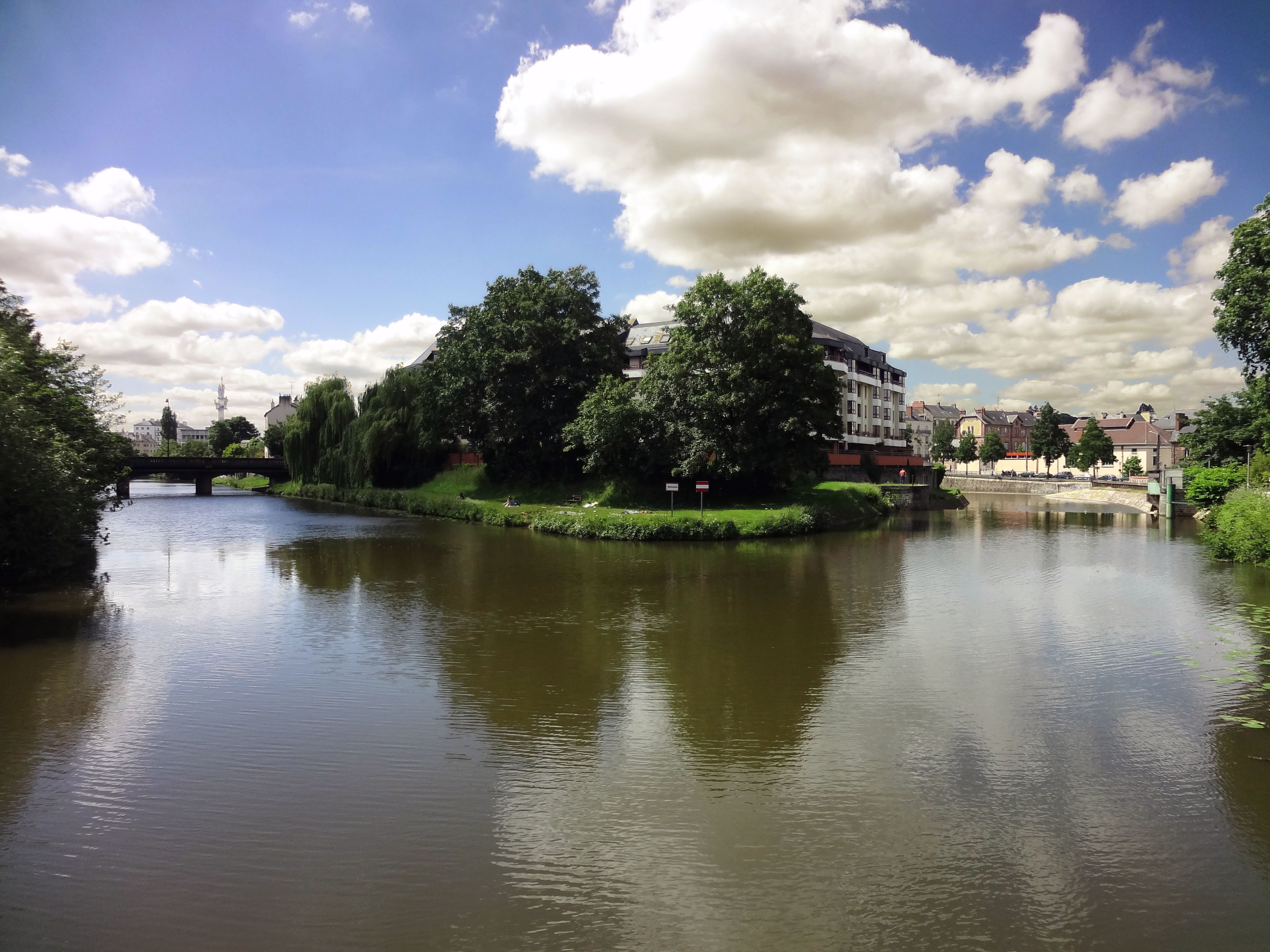 Iles Saint-Hélier, Rennes